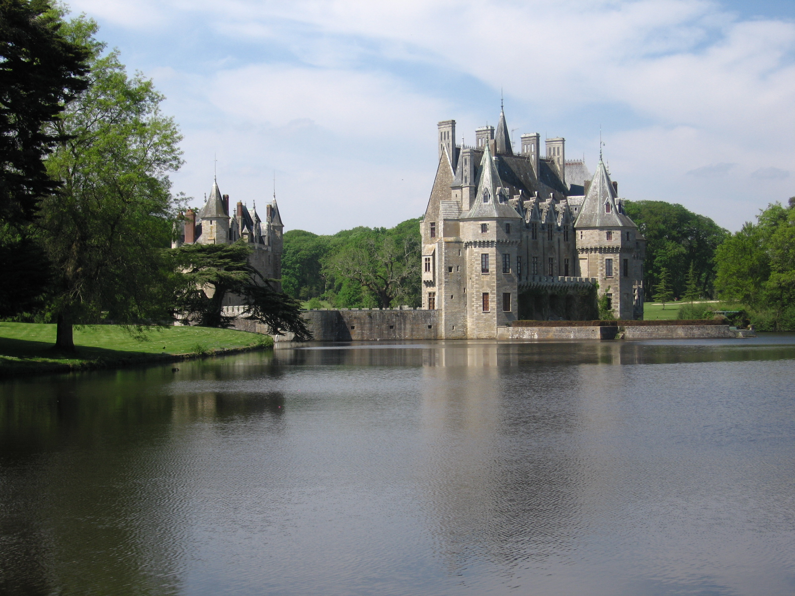 Château de la Bretesche, Loire-Atlantique, France .